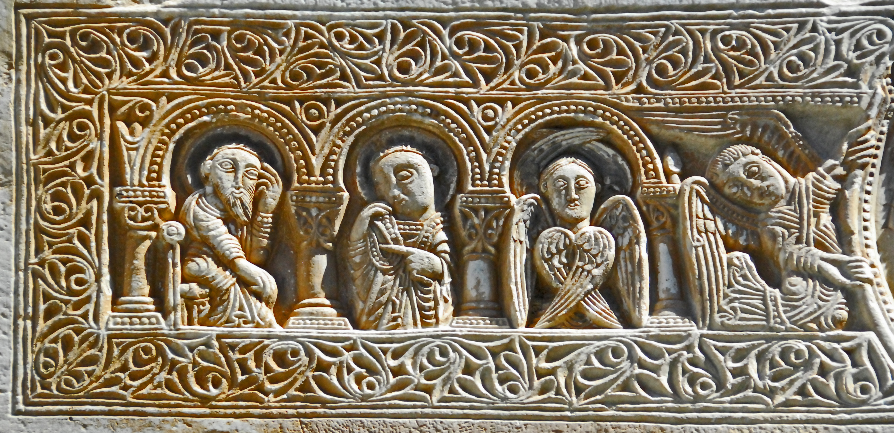 St-André-de-Sorède, Tßürsturz, linke Seite